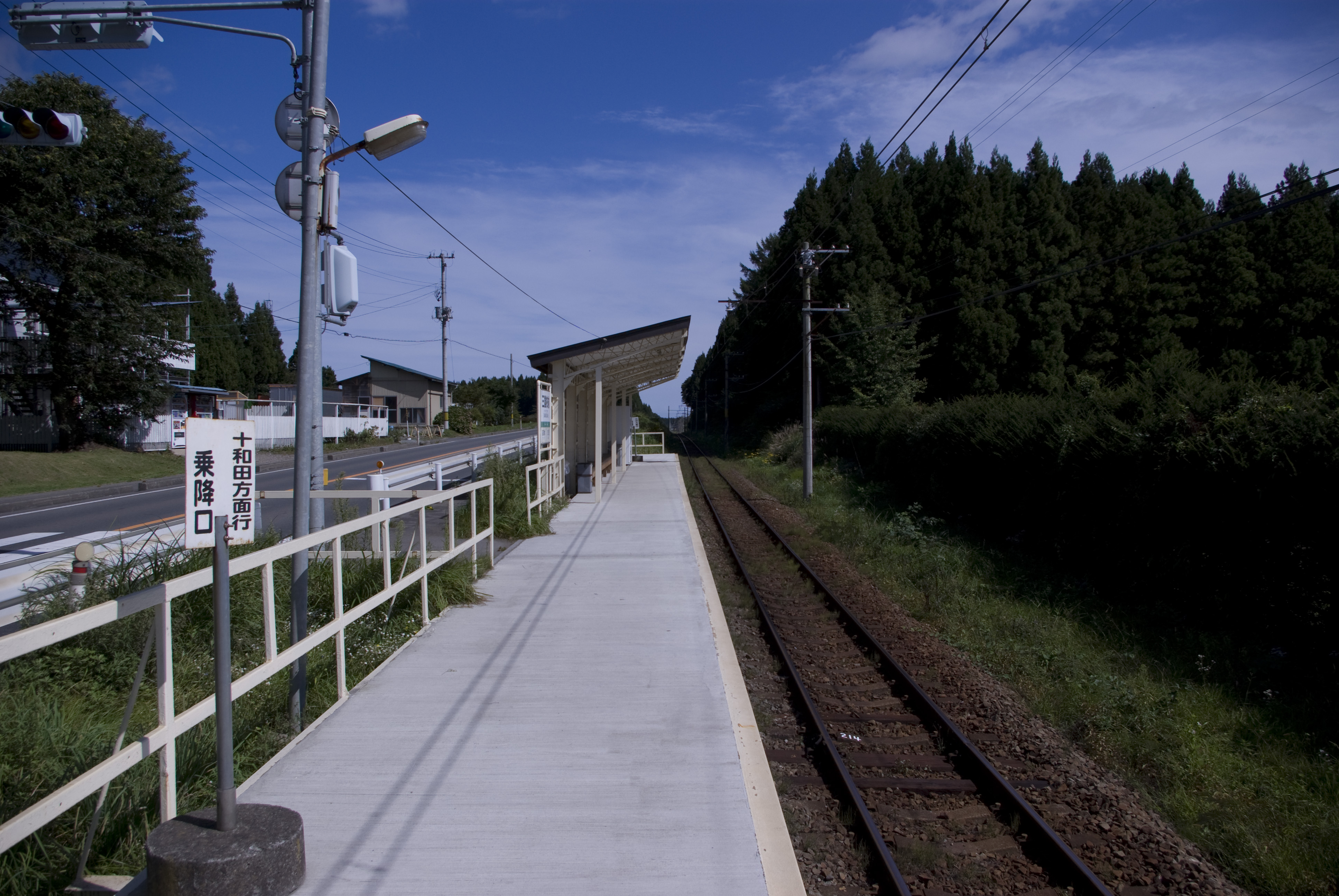 十和田観光電鉄三農校前駅